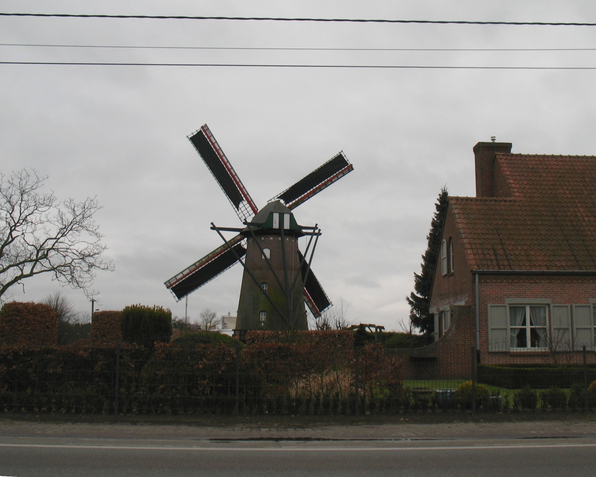 De Scherpenbergmolen te Westmalle, provincie Antwerpen